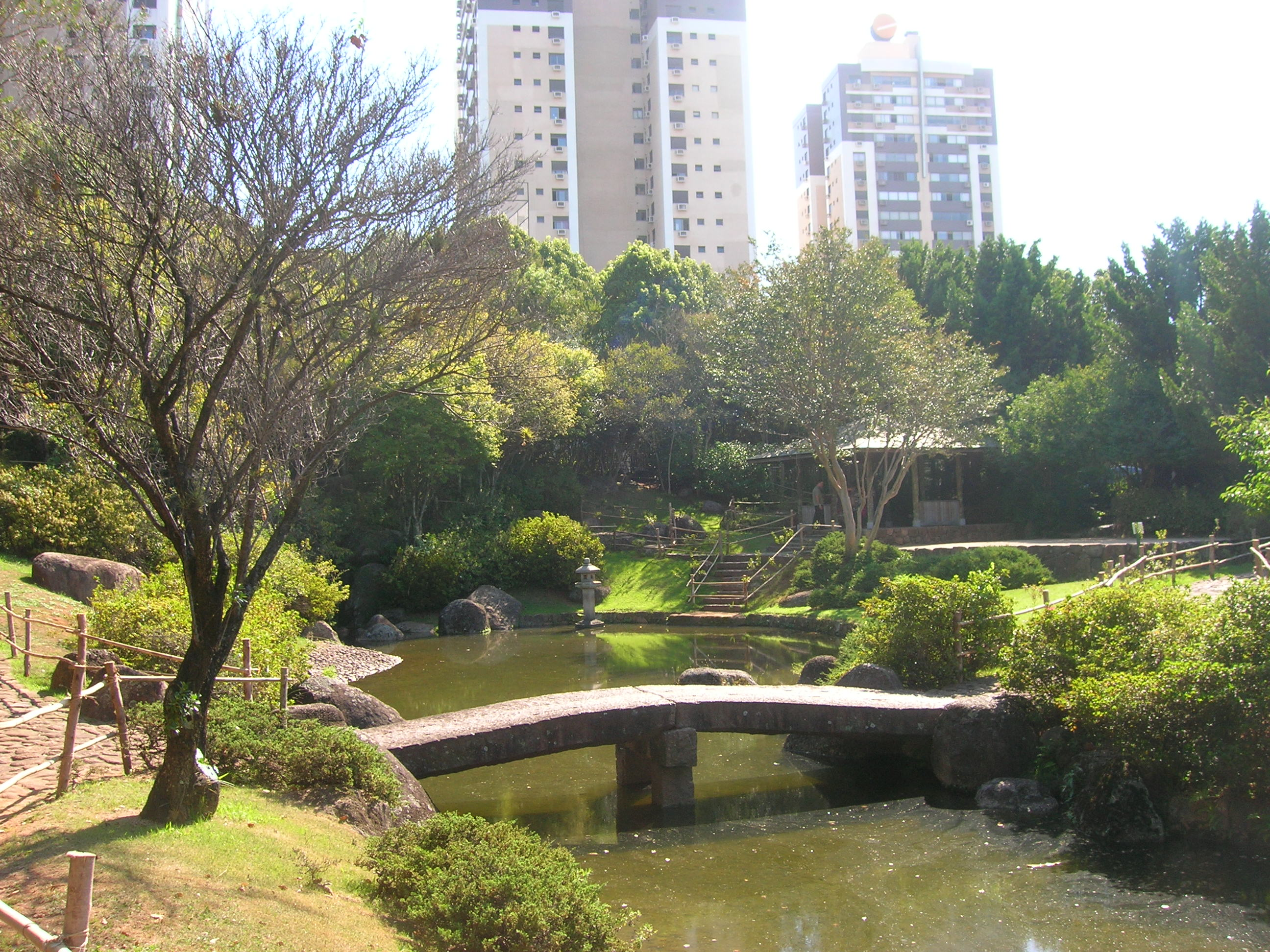 A Praça Shiga, em Porto Alegre.